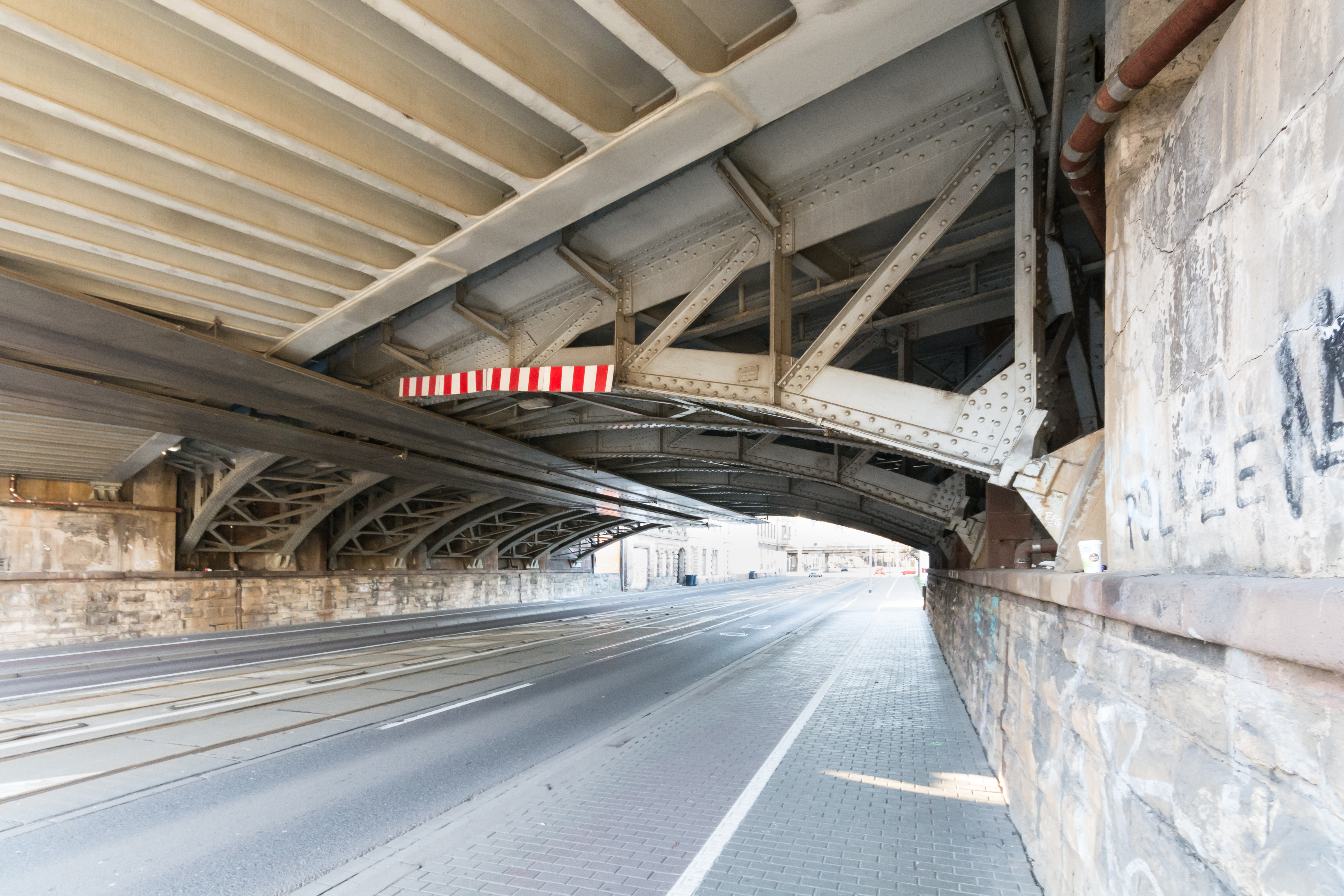 Unterführung Hallische Straße in Magdeburg-Altstadt. This is a photograph of an architectural monument. 71166